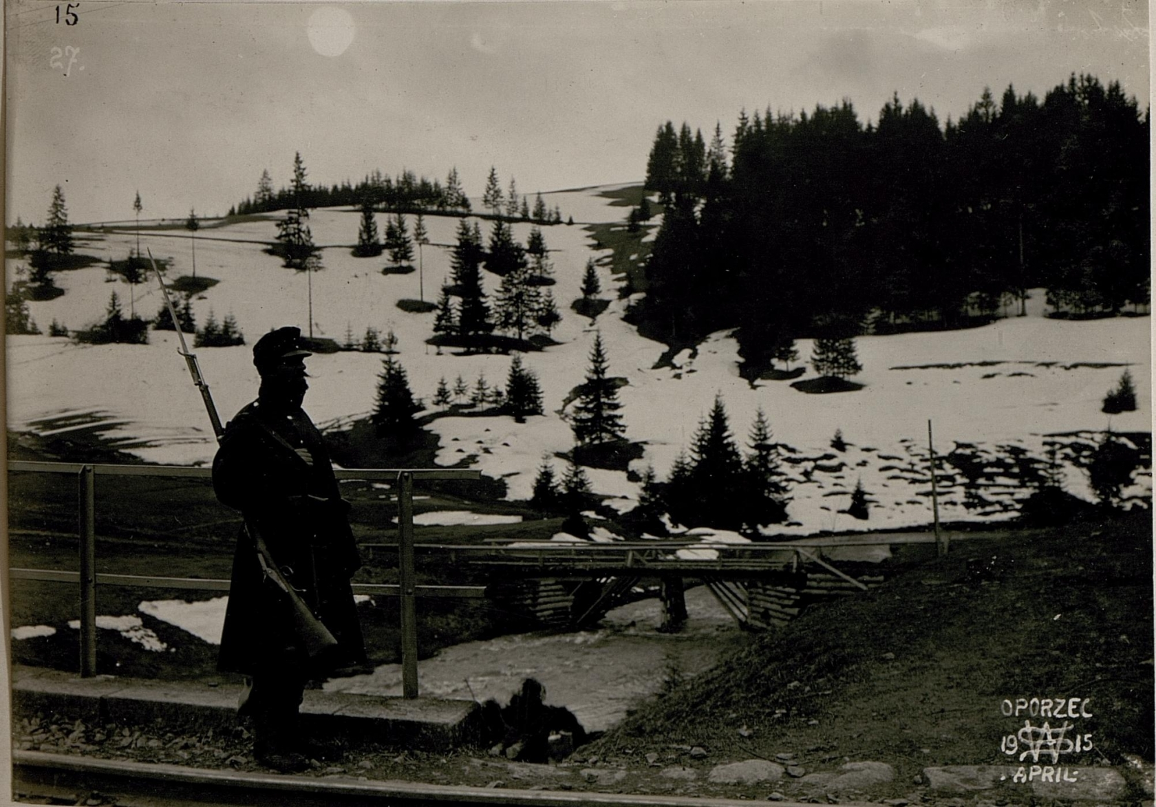 Brückenwache, Oporzec.